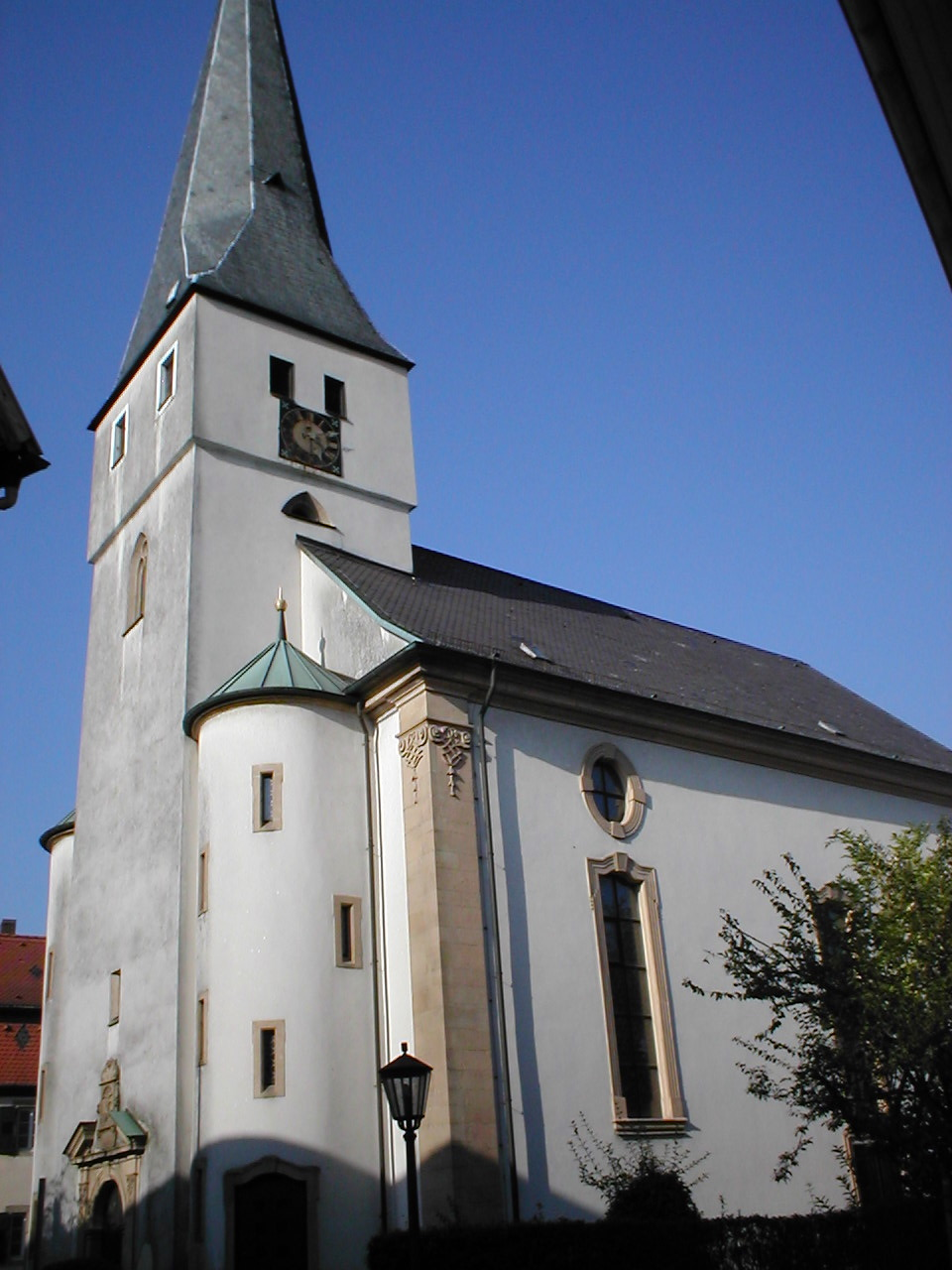 Pfarrkirche St. Laurentius in Neudenau, wurde ab 1742 im spätbarocken Stil erbaut